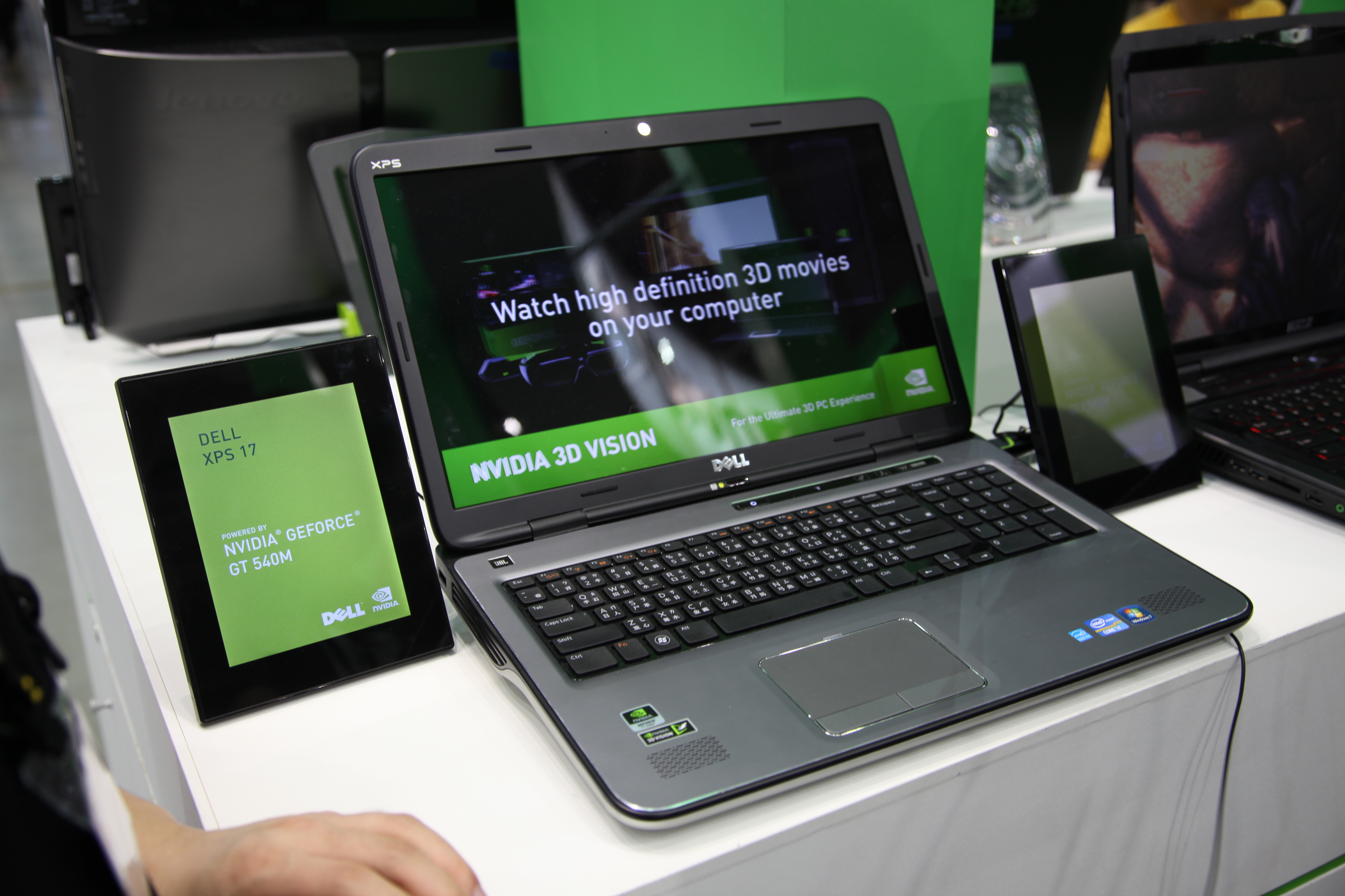 2011台北國際電腦展，戴爾筆記型電腦XPS 17。